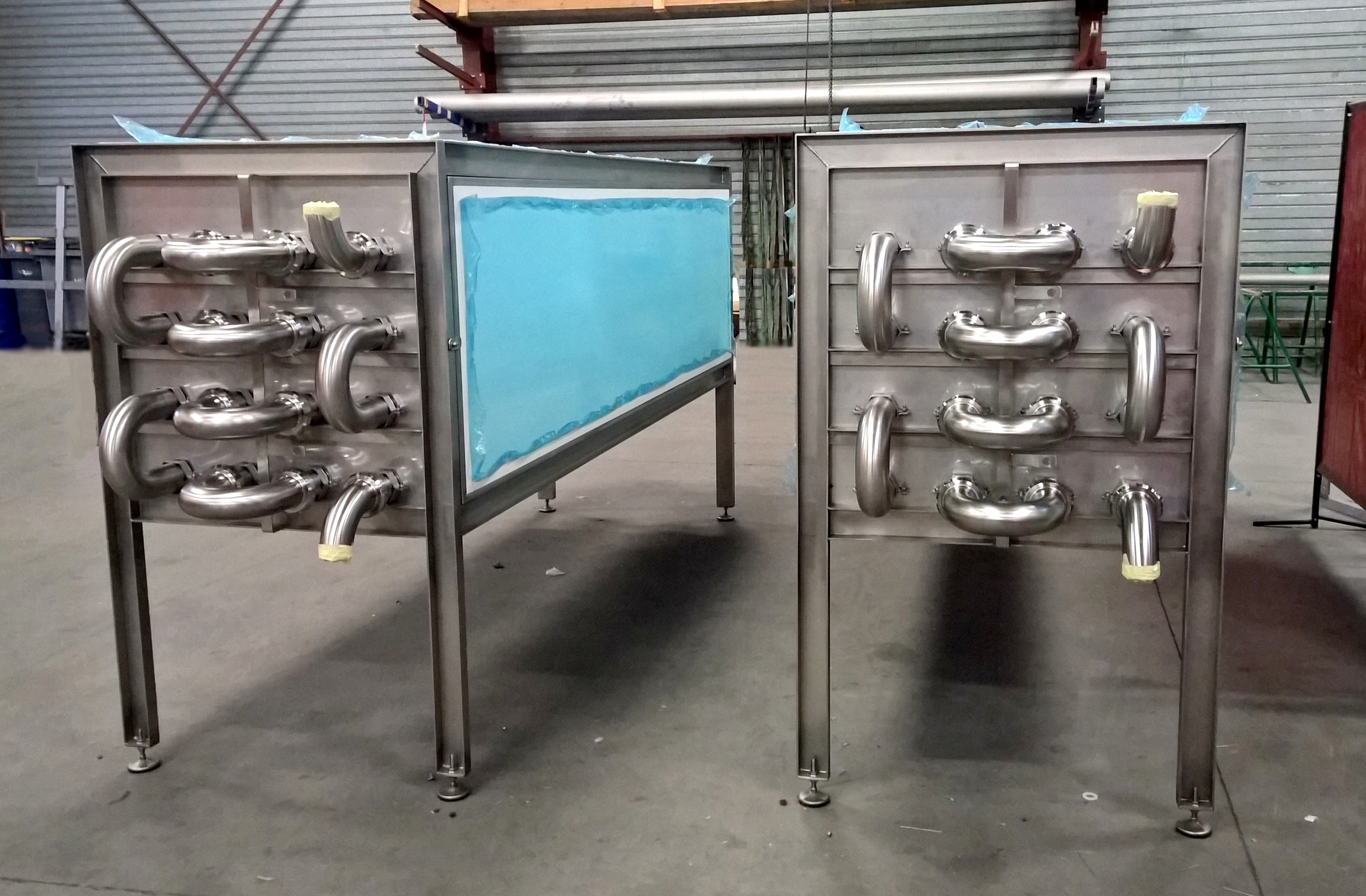 Chambreur inox calorifugé